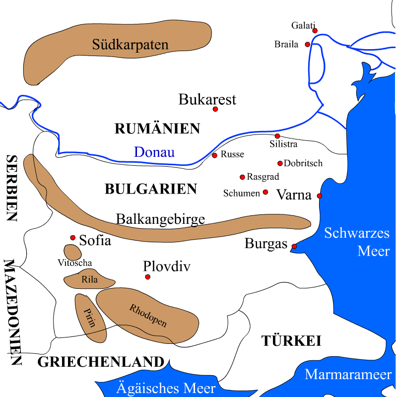 BGDobritsch